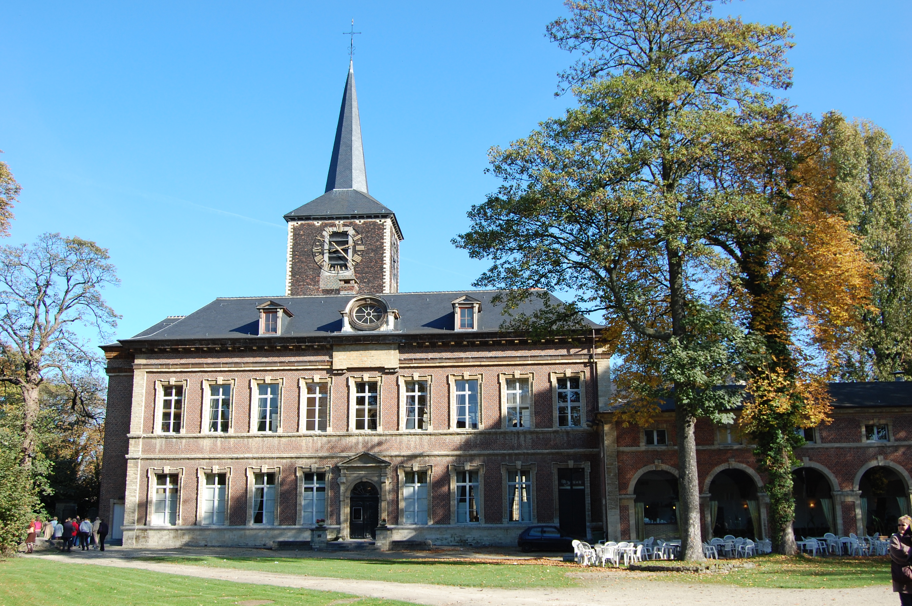 Abbaye de Forest (1190 Bruxelles)